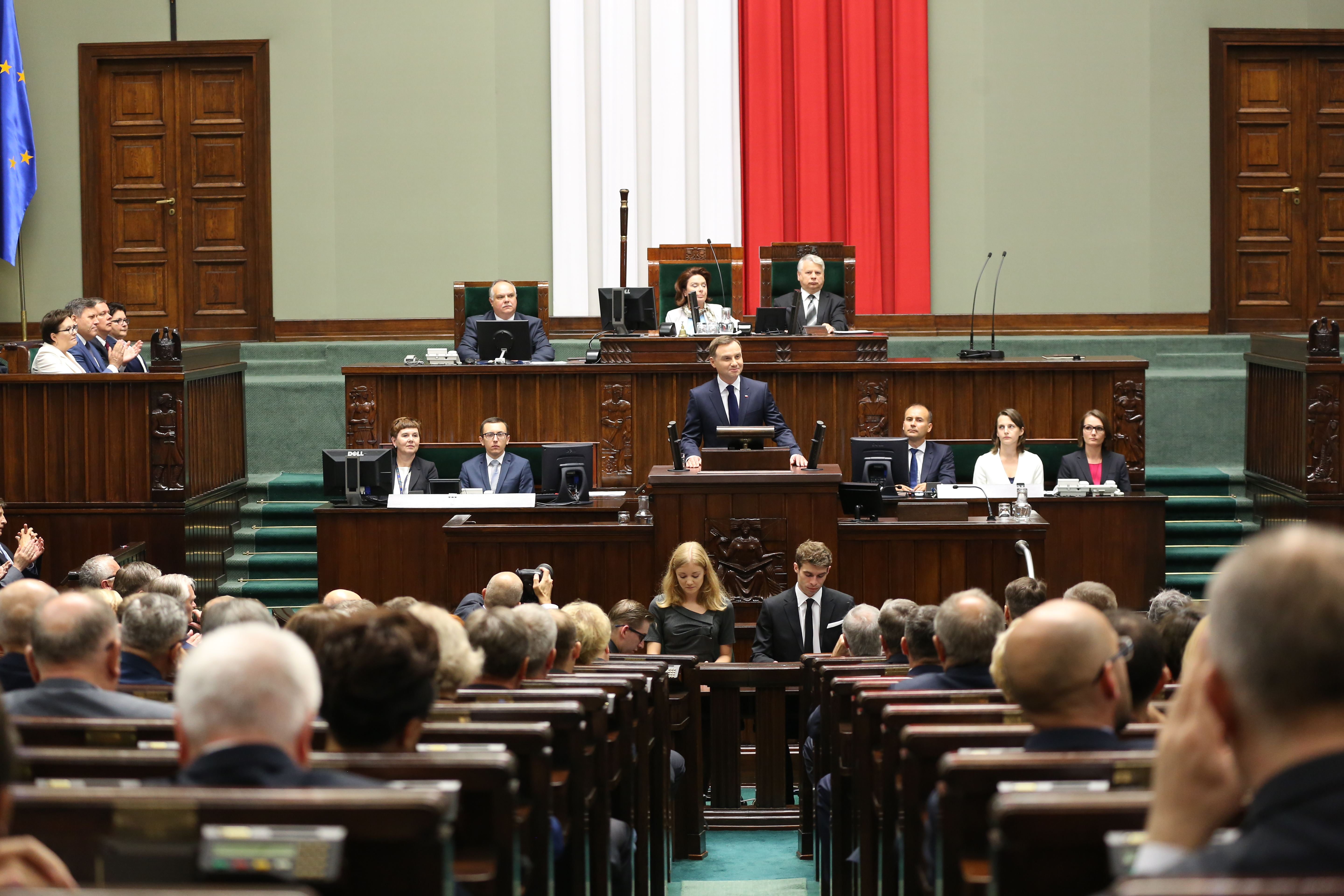 Prezydent Andrzej Duda wygłaszający orędzie przed Zgromadzeniem Narodowym zwołanym w celu odebrania przysięgi od nowo wybranego prezydenta